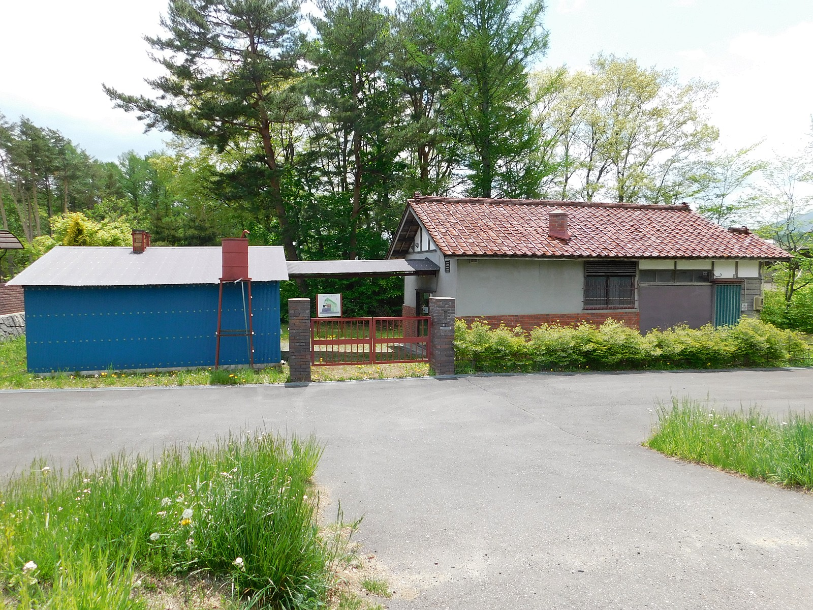 岩手県遠野市にある加守田章二陶房跡。右が住宅、左が窯場。